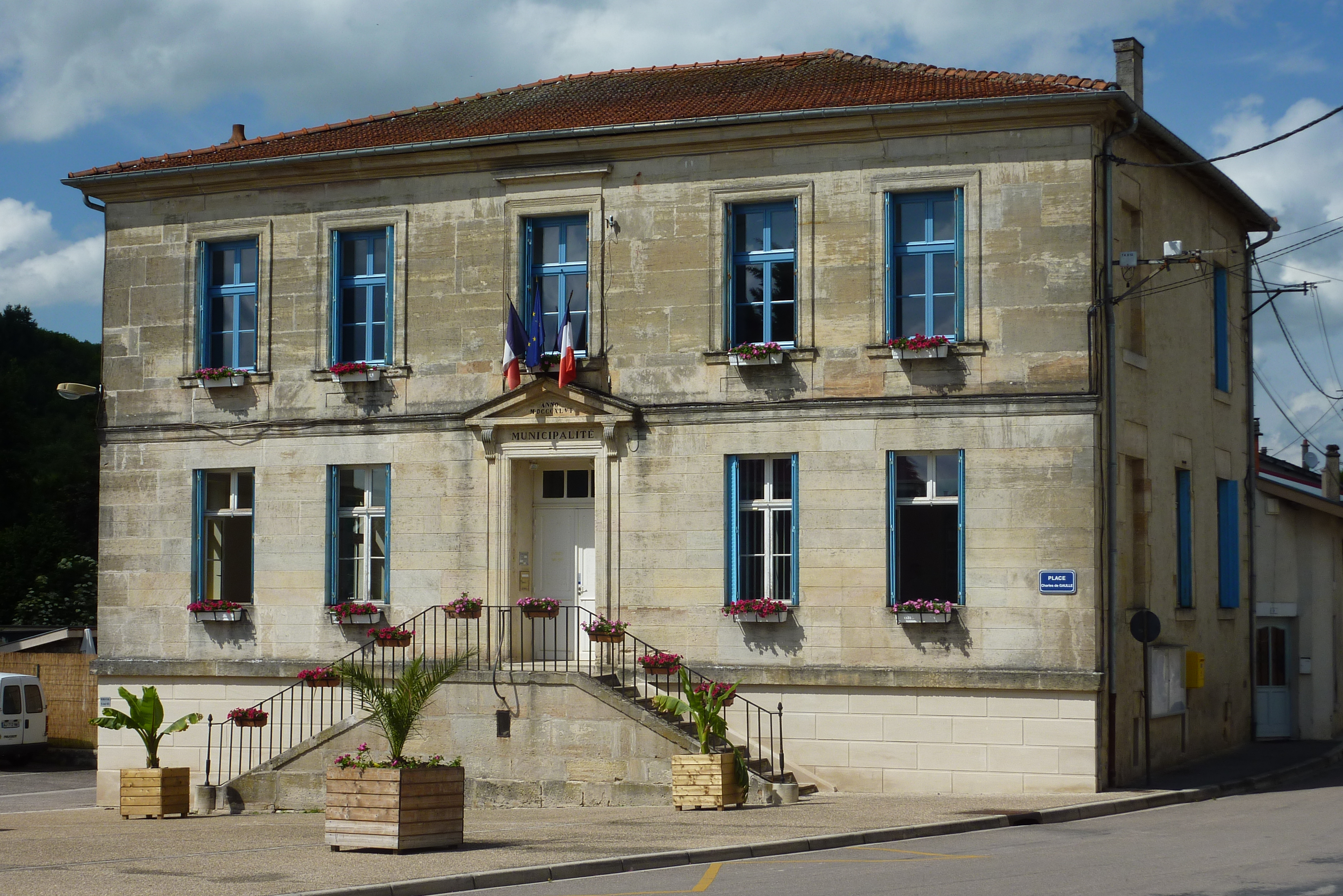 Mairie de Naives-Rosières, place Charles de Gaulle